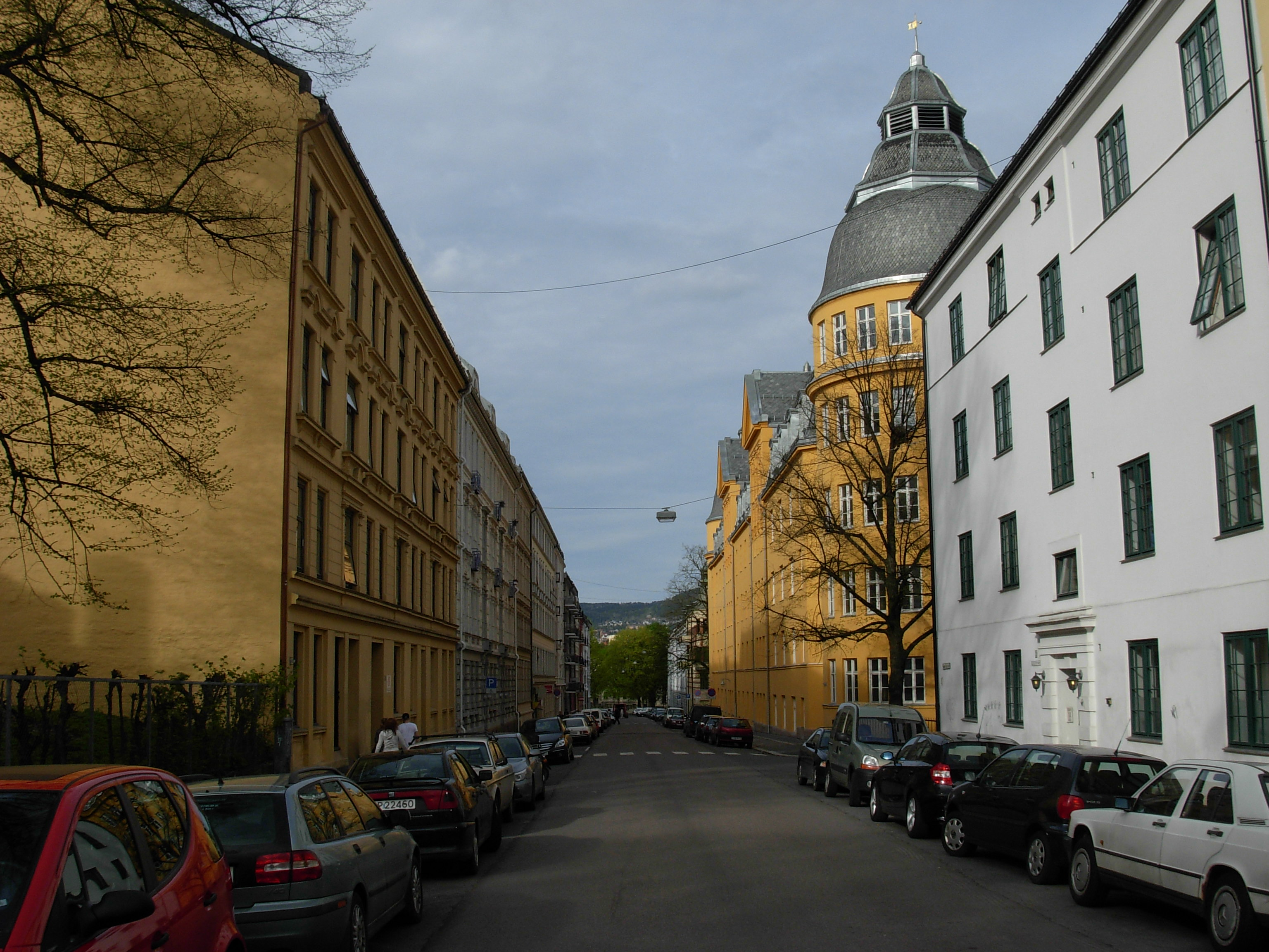 Hermann Foss' gate, Ila, Oslo